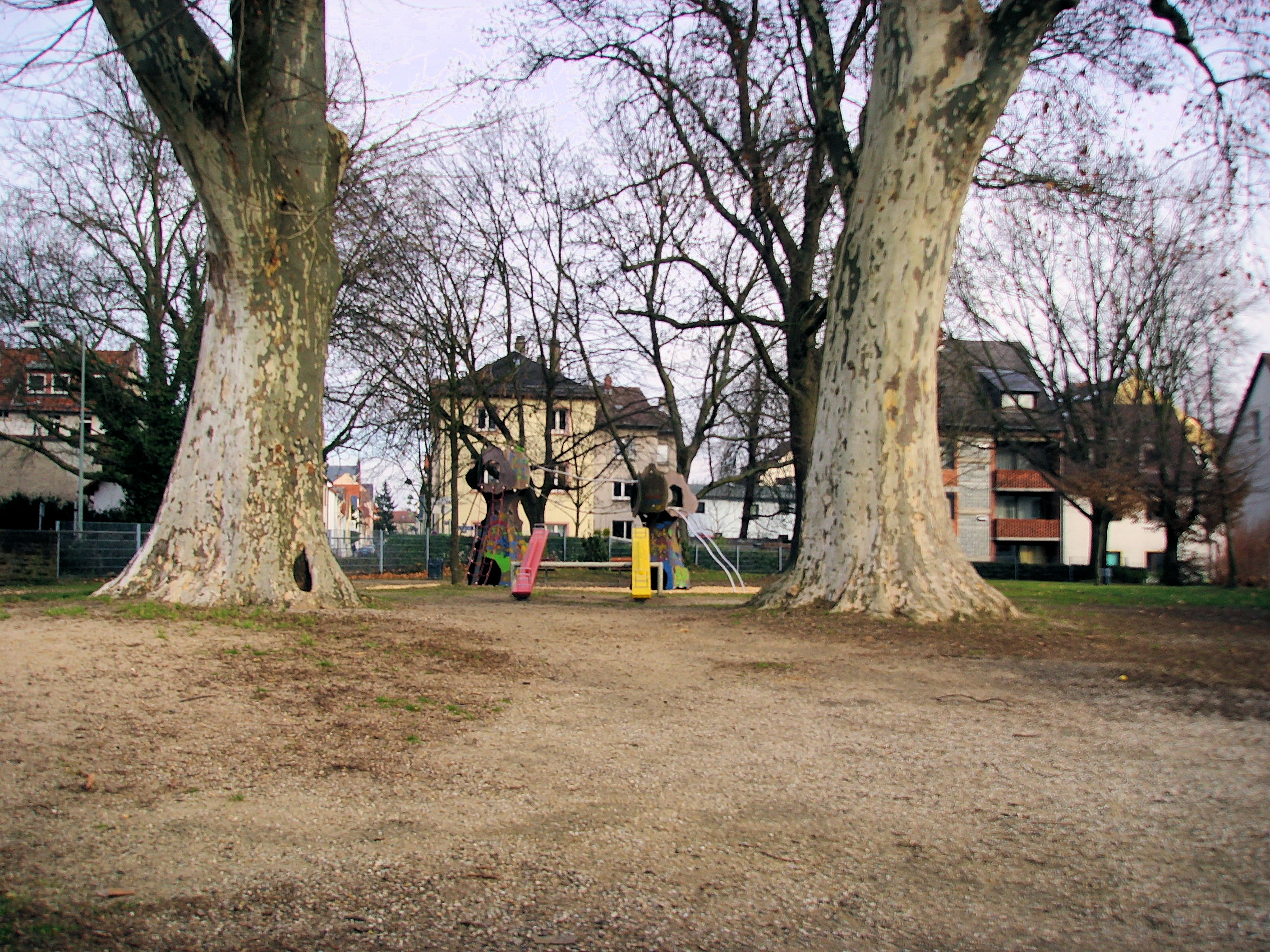 Frankfurt am Main-Heddernheim, ehemaliger Friedhof (Erstbelegung 1743), heute öffentlicher Spielplatz, Einmündung Kirchstraße/In der Römerstadt